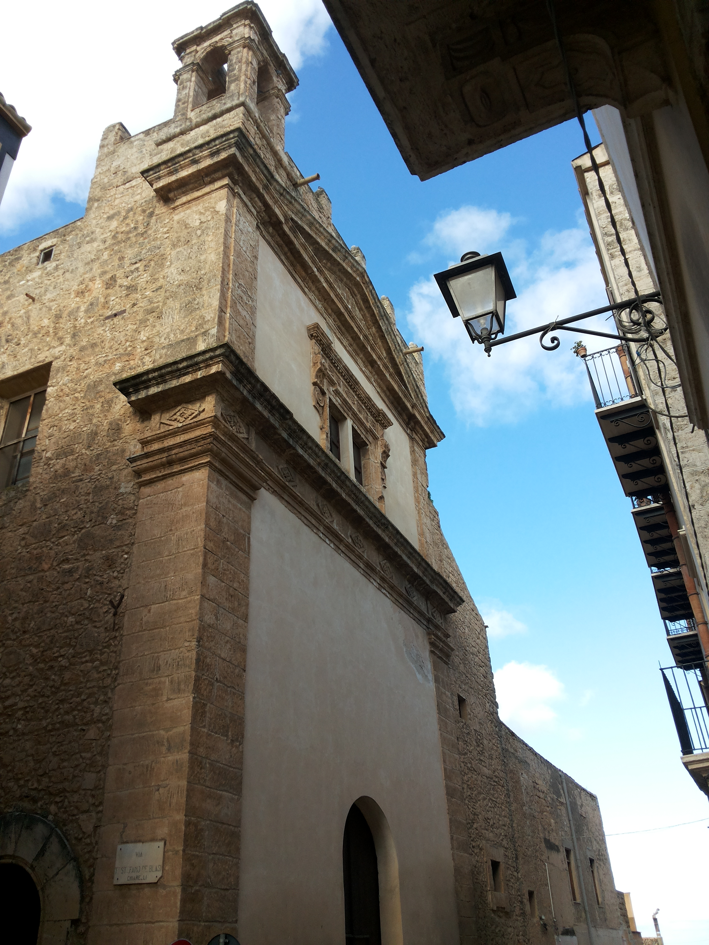 Chiesa del Santissimo Salvatore (Alcamo)